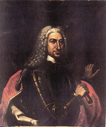 ritratto dell'ultimo Duca di Guastalla, Giuseppe Maria Gonzaga (1690-1746)